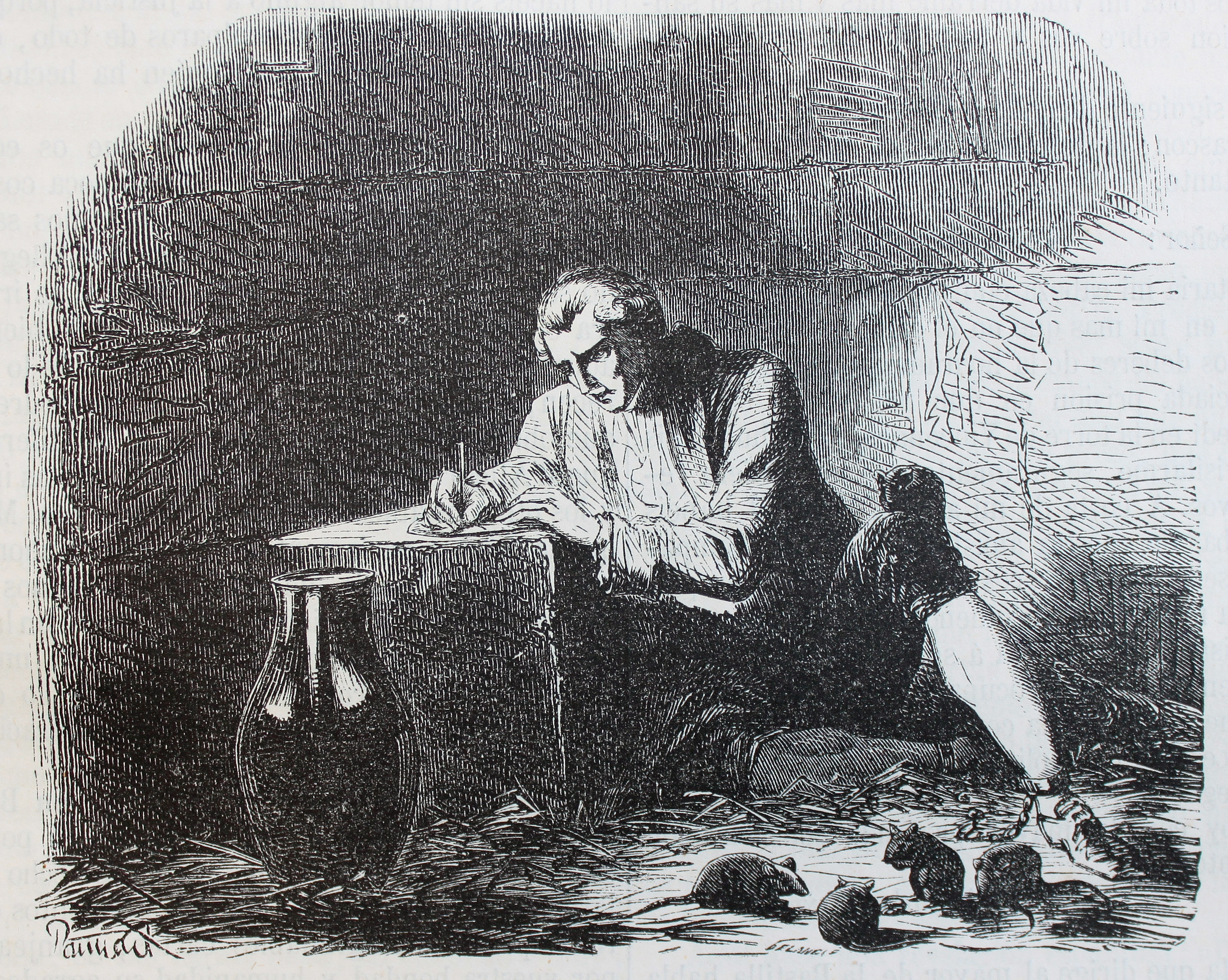 Ilustraciones de la obra : Anales dramáticos del crimen ó Causas célebres españolas y estranjeras [sic] / estractadas [sic] de los originales y traducidas, bajo la dirección de José de Vicente y Caravantes. - Madrid : Imprenta de Fernando Gaspar [etc.], 1858-1866. - Ed. il. con grabados... "Las asociaciones de malhechores. De este modo consiguió escribir Latude una memoria muy circunstanciada".